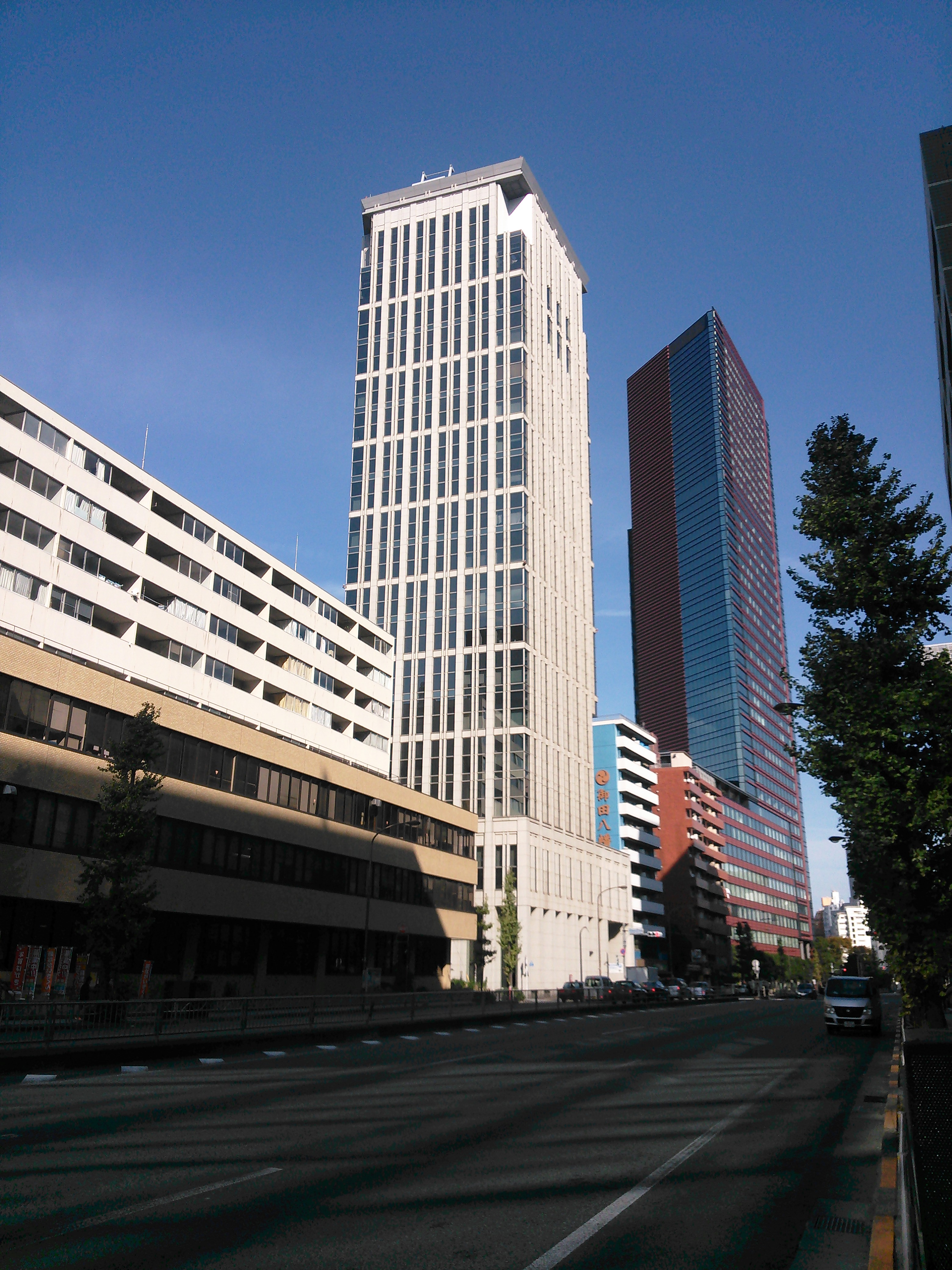 東京都港区三田、ザ・イトヤマタワー